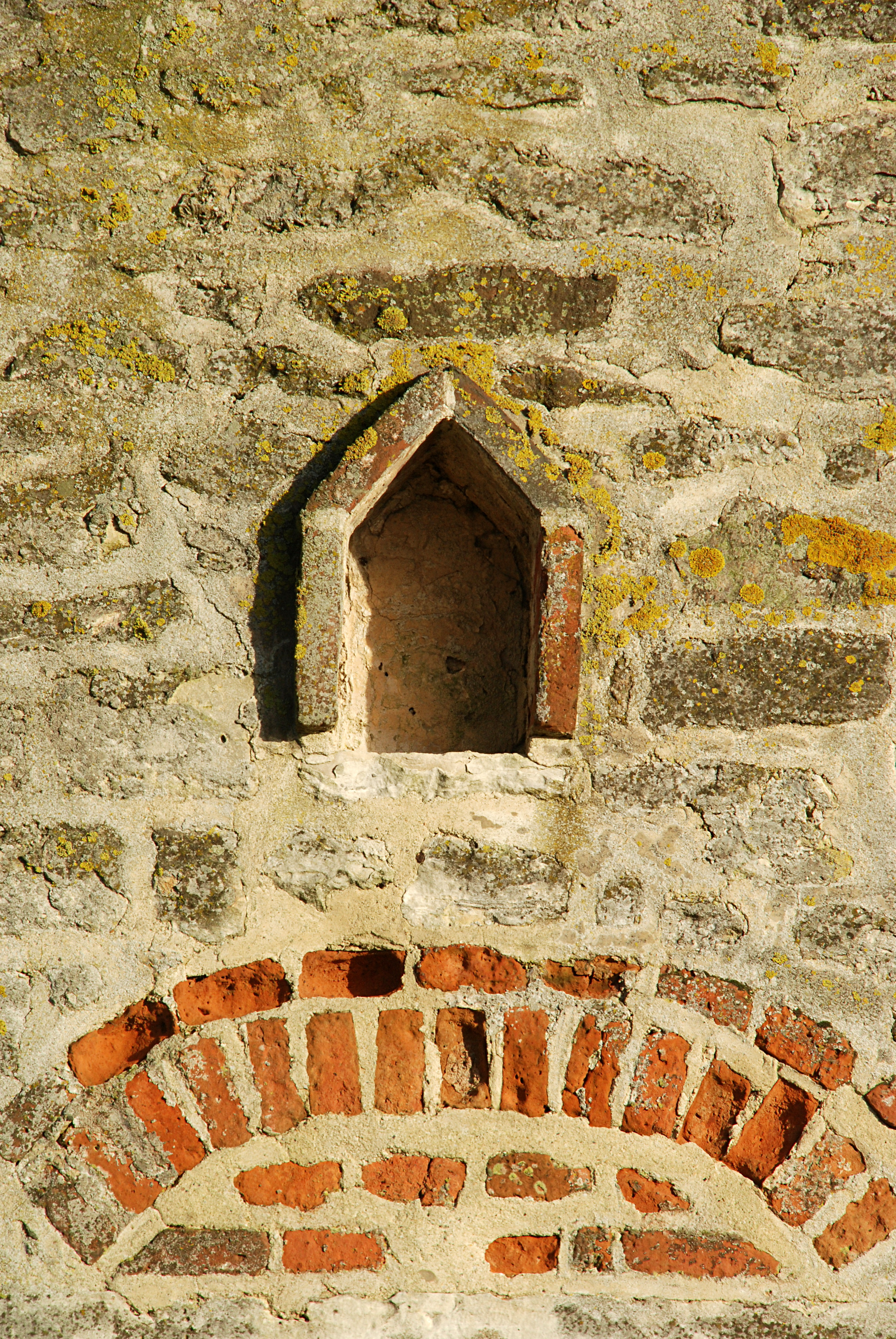 Belgique - Brabant wallon - Chaumont-Gistoux - Longueville - Chapelle du Chêneau